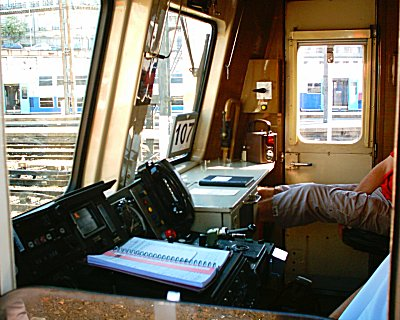 Intérieur Voiture de banlieue à deux niveaux #107 à Paris Saint Lazare en 2004.